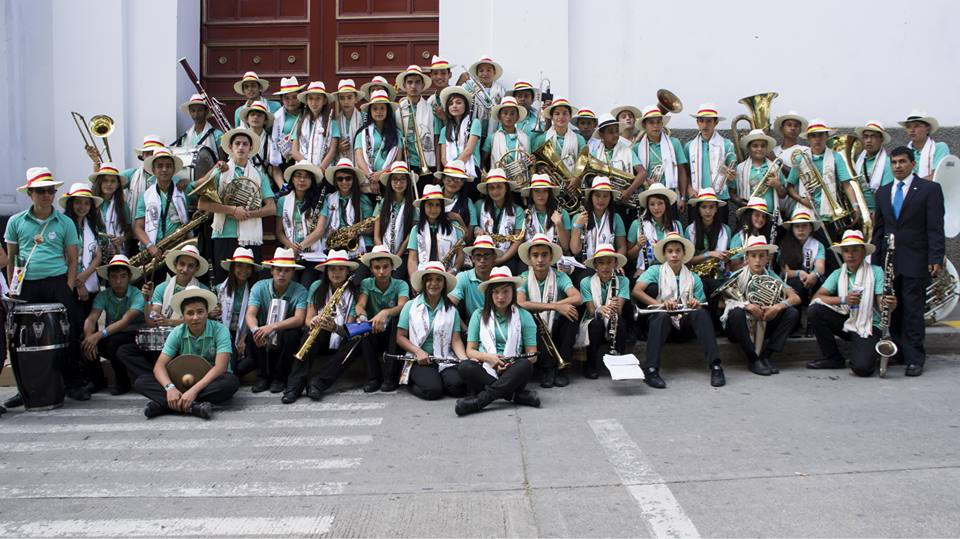 Banda Sinfónica de Anserma 2015 en el parque central del municipio de Aguadas Caldas